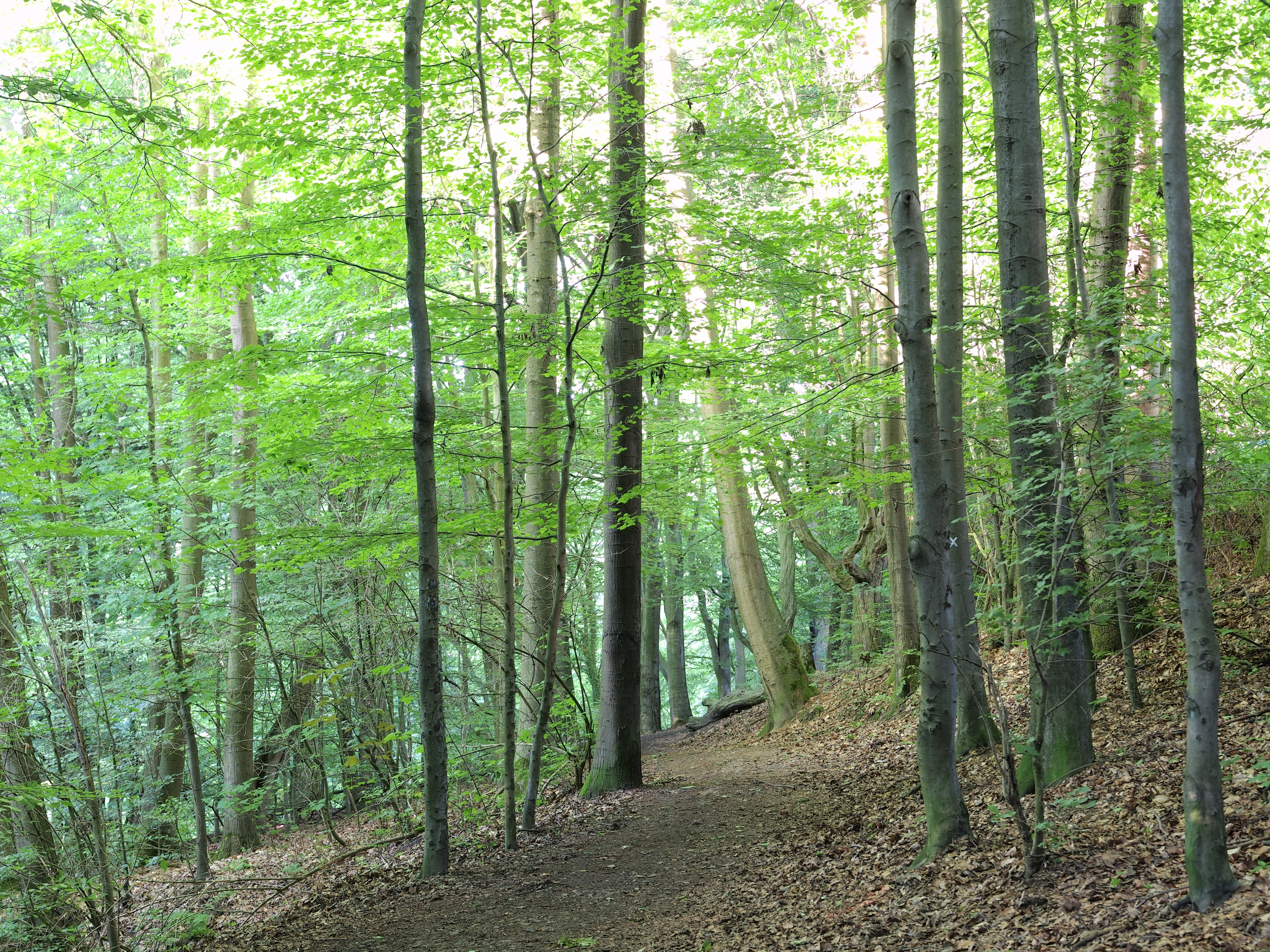 Naturschutzgebiet Langeloh - In der Hemke in Herne, Buchenwald